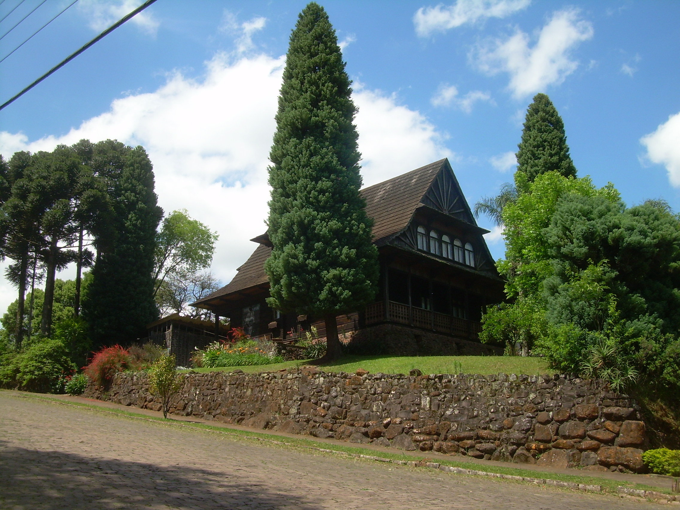 Casa típica dos imigrantes poloneses em Nova Prata, Rio Grande do Sul, Brasil.